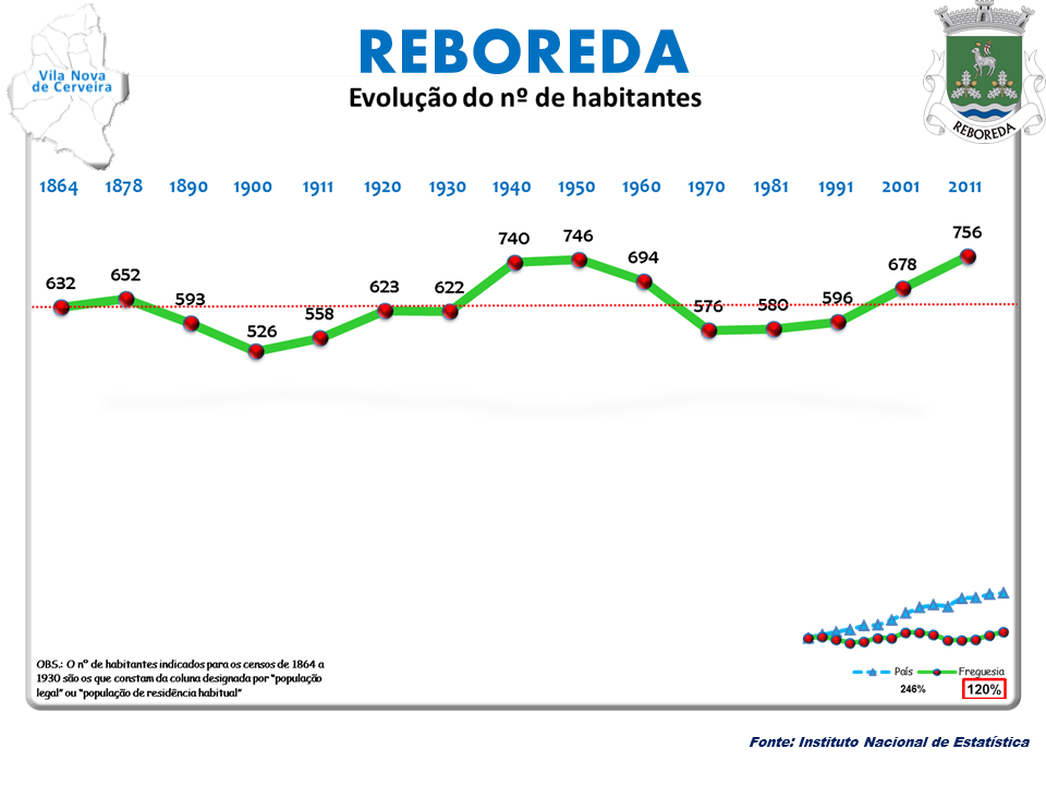 Censos 1864/2011